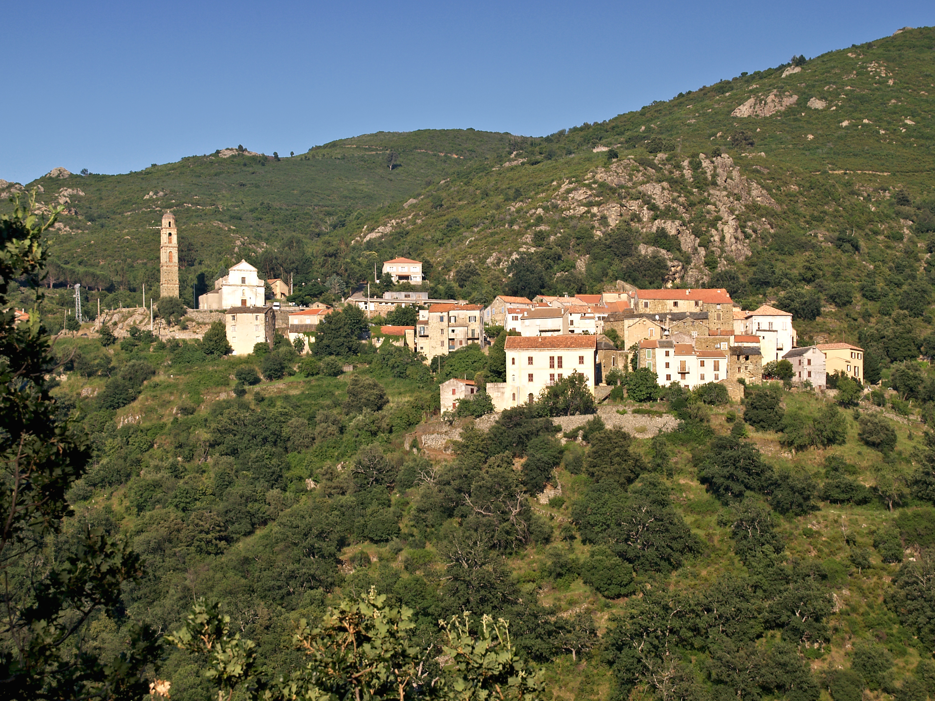 Piève (Corsica) - Vue du village